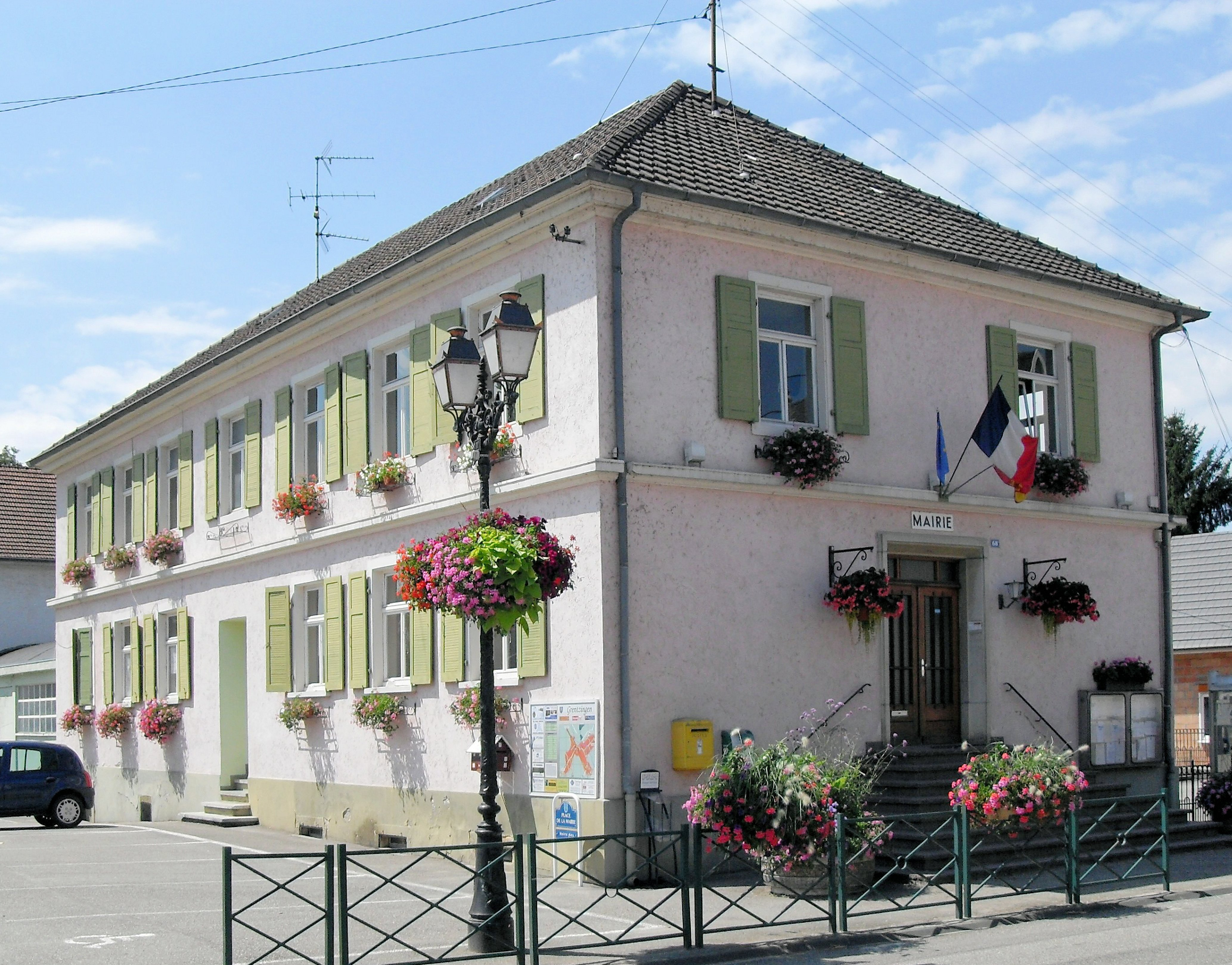 La mairie de Grentzingen